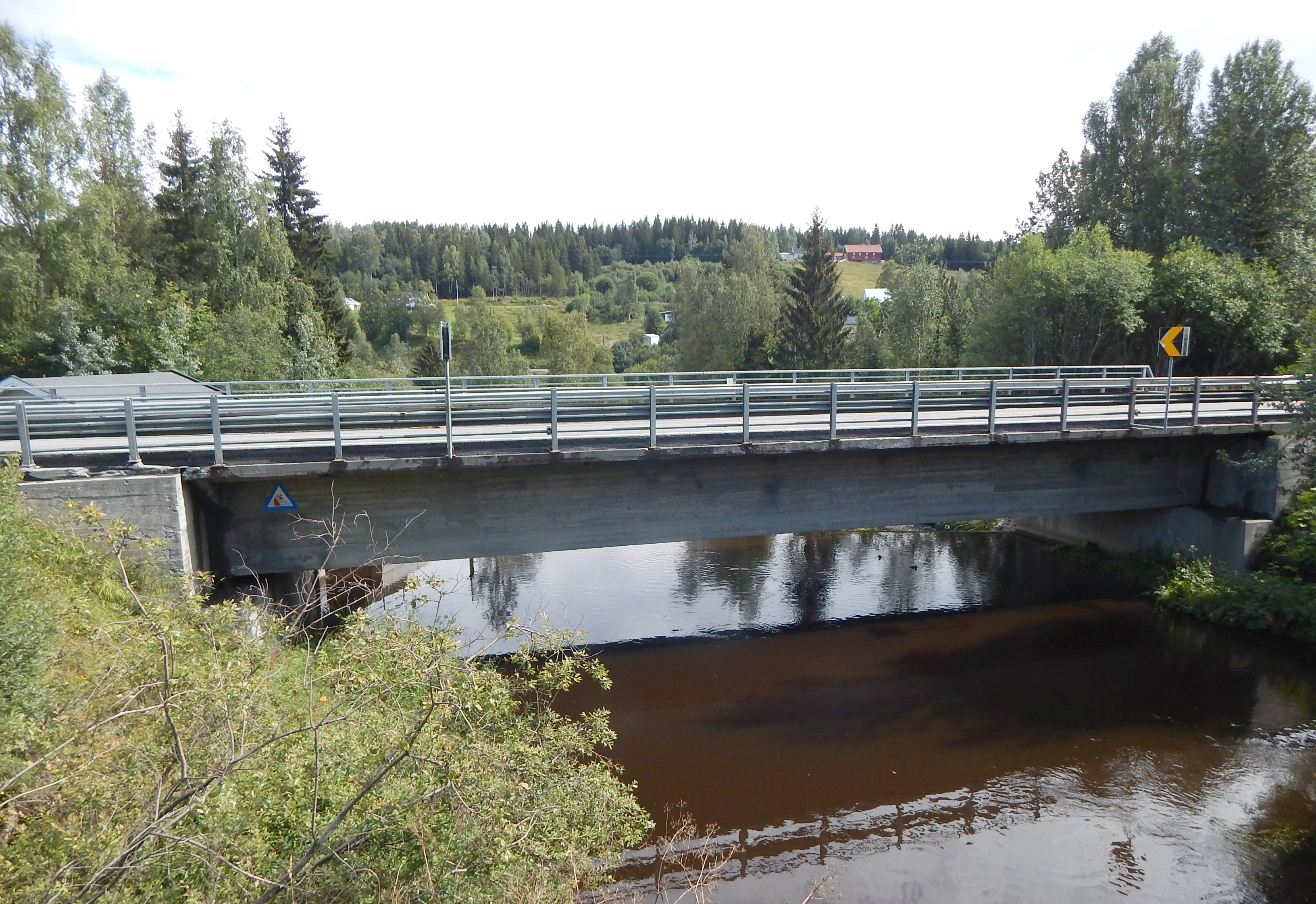 Breiskallen bru med fylkesvei 110